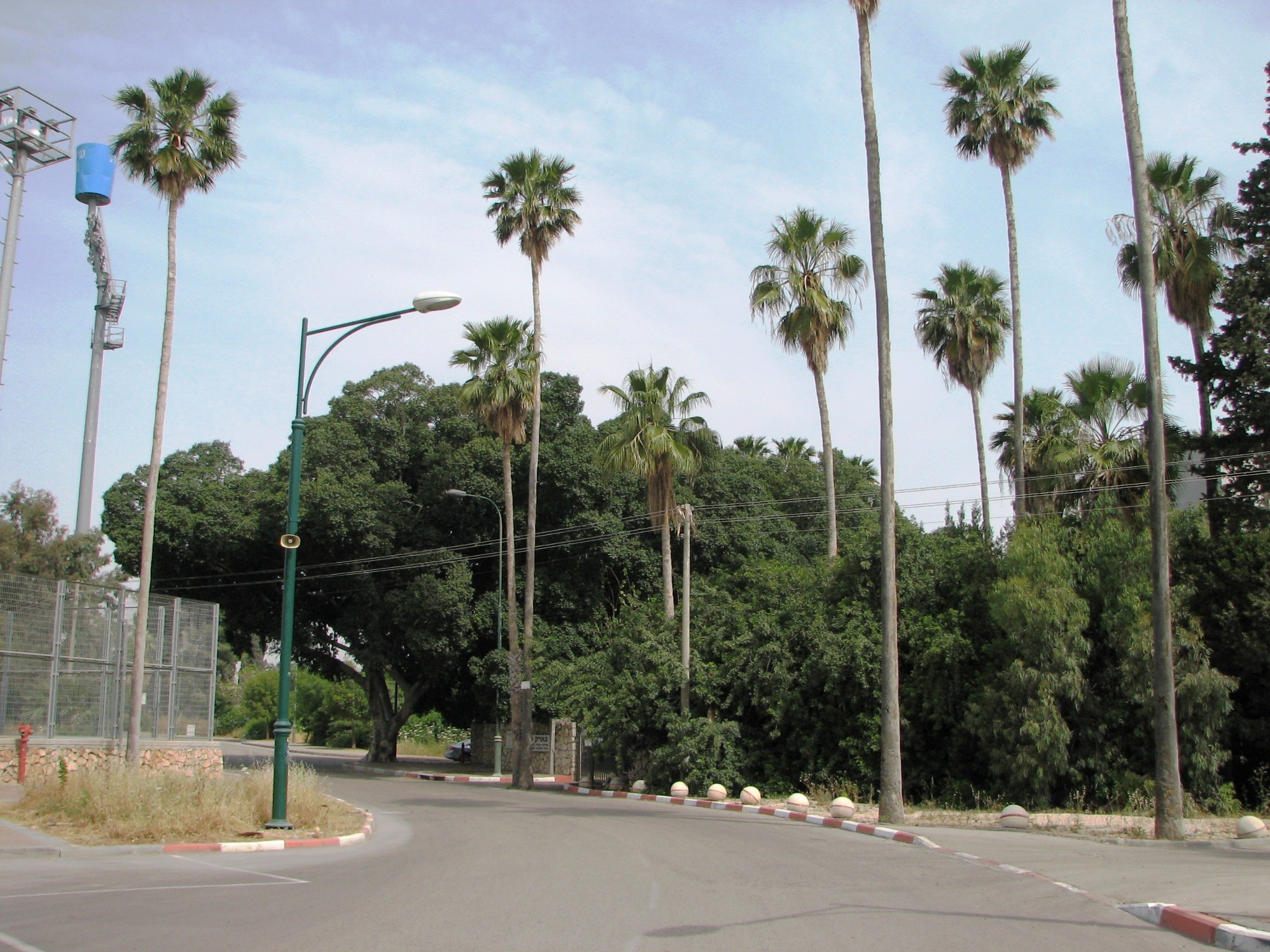 Central Nesher neighborhood, area near Nesher Israel Cement Enterprises האזור ליד בית החרושת נשר למלט בשכונת מרכז נשר בעיר נשר עץ פיקוס השדרות . ניטע בשנות ה- 30 של המאה ה-20 בחצר בית הספר היסודי בית יהושע הנמצא מימינו. על עץ זה טיפסו כל ילדי בית הספר בהפסקות, או כאשר סולקו מהכיתה והציצו לתוך כיתות הלימוד